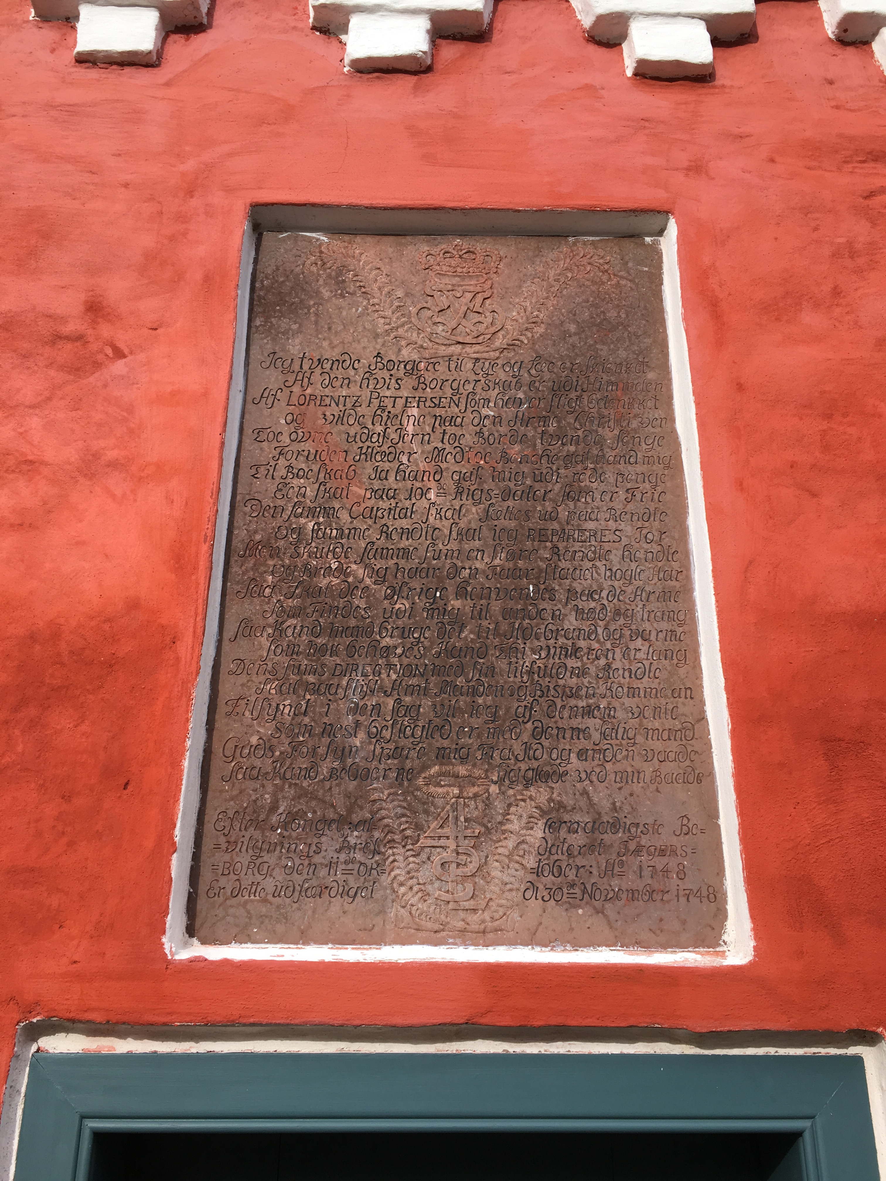 Latinskolen i Skælskør, stenplade over døren